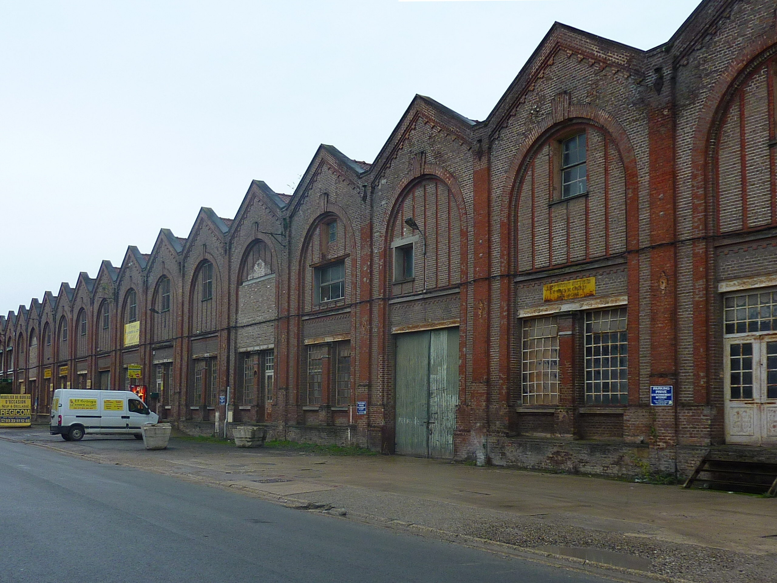 Ancienne manufacture des frères Saint - Flixecourt Picardie France